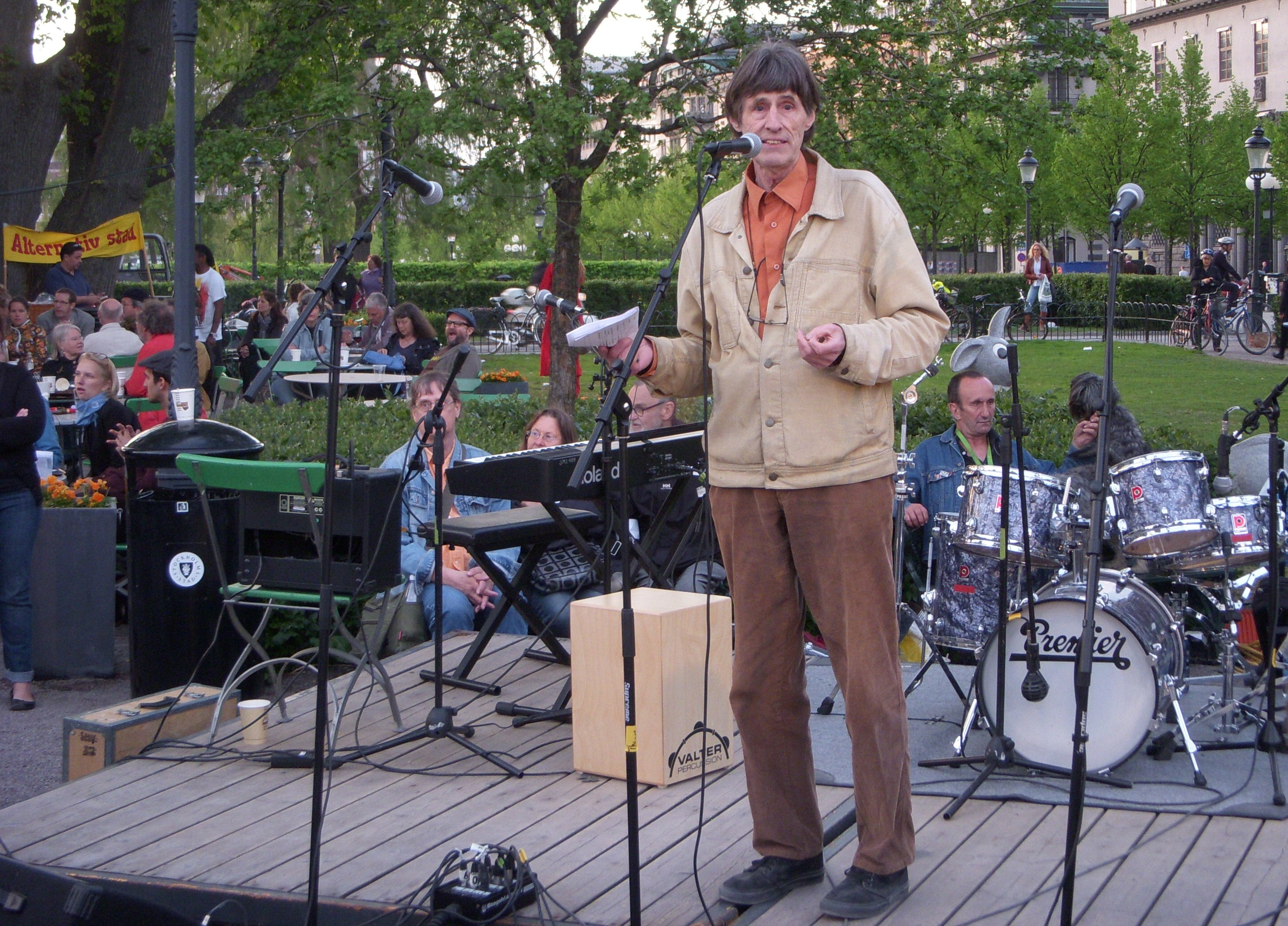 Göran Folin, veteran från almstriden